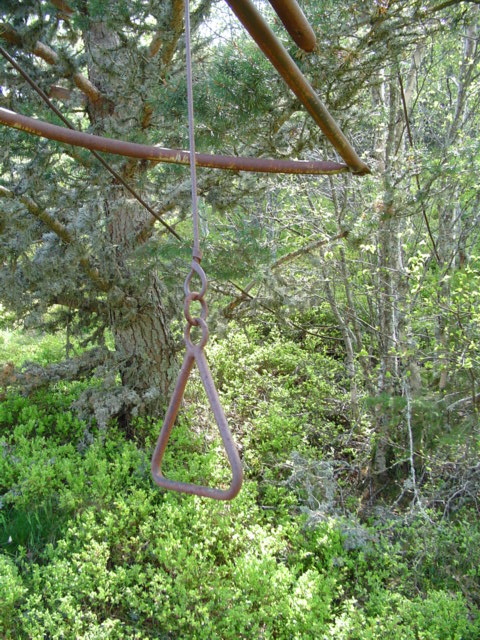 station de la haute vallée